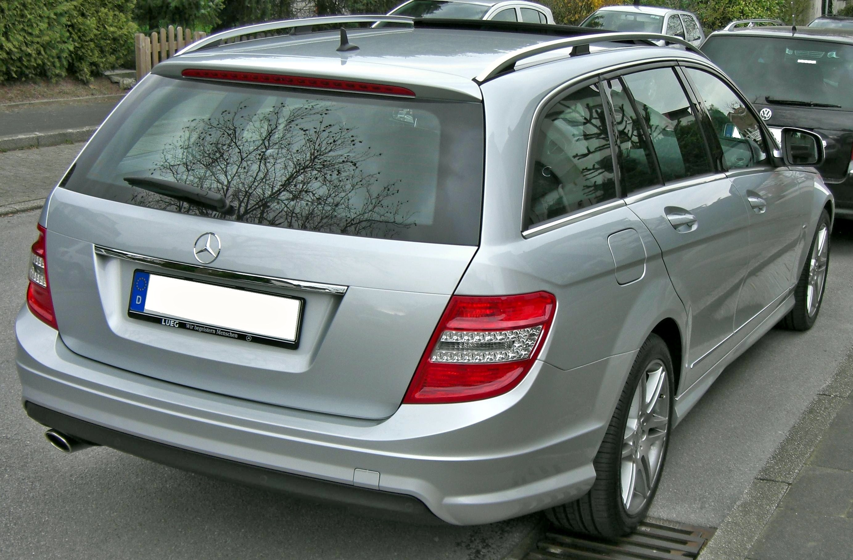 Mercedes C-Klasse T-Modell